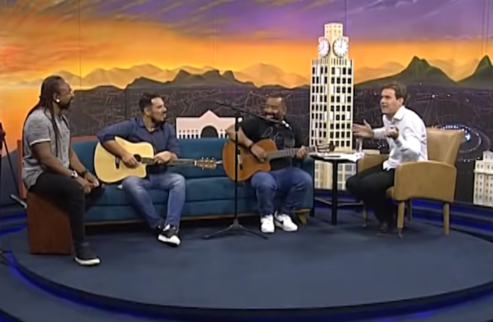 Integrantes da banda Trazendo a Arca num programa da Rede Boas Novas, em 2018.